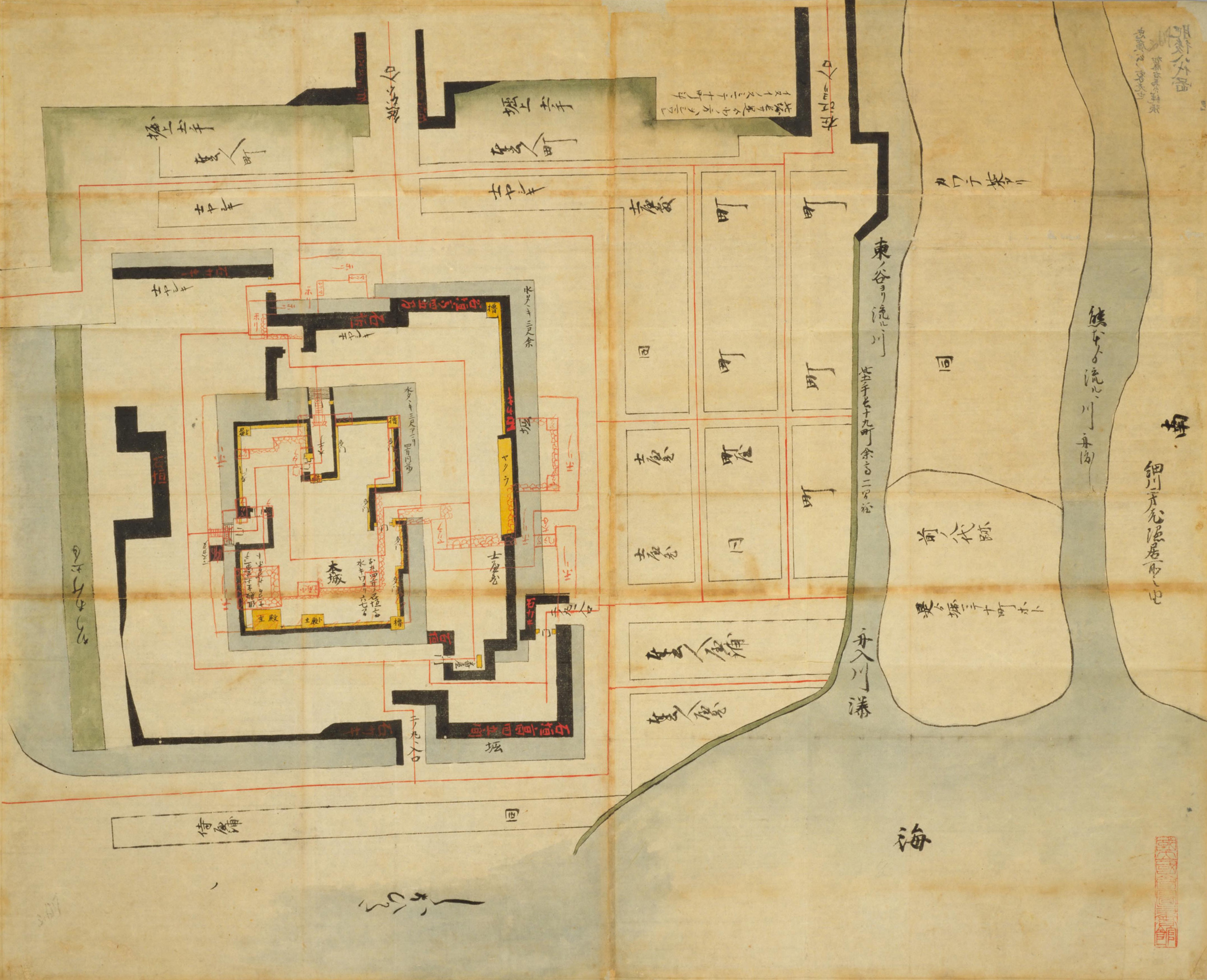 〔日本古城絵図〕 西海道之部（2）. 329 肥後八代図 （江戸中期－末期の作）